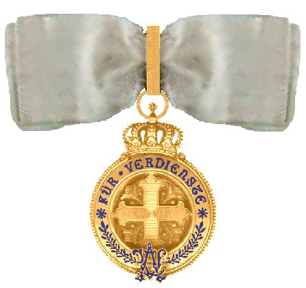 Het Pruisische kruis voor Verdienste voor drouwen